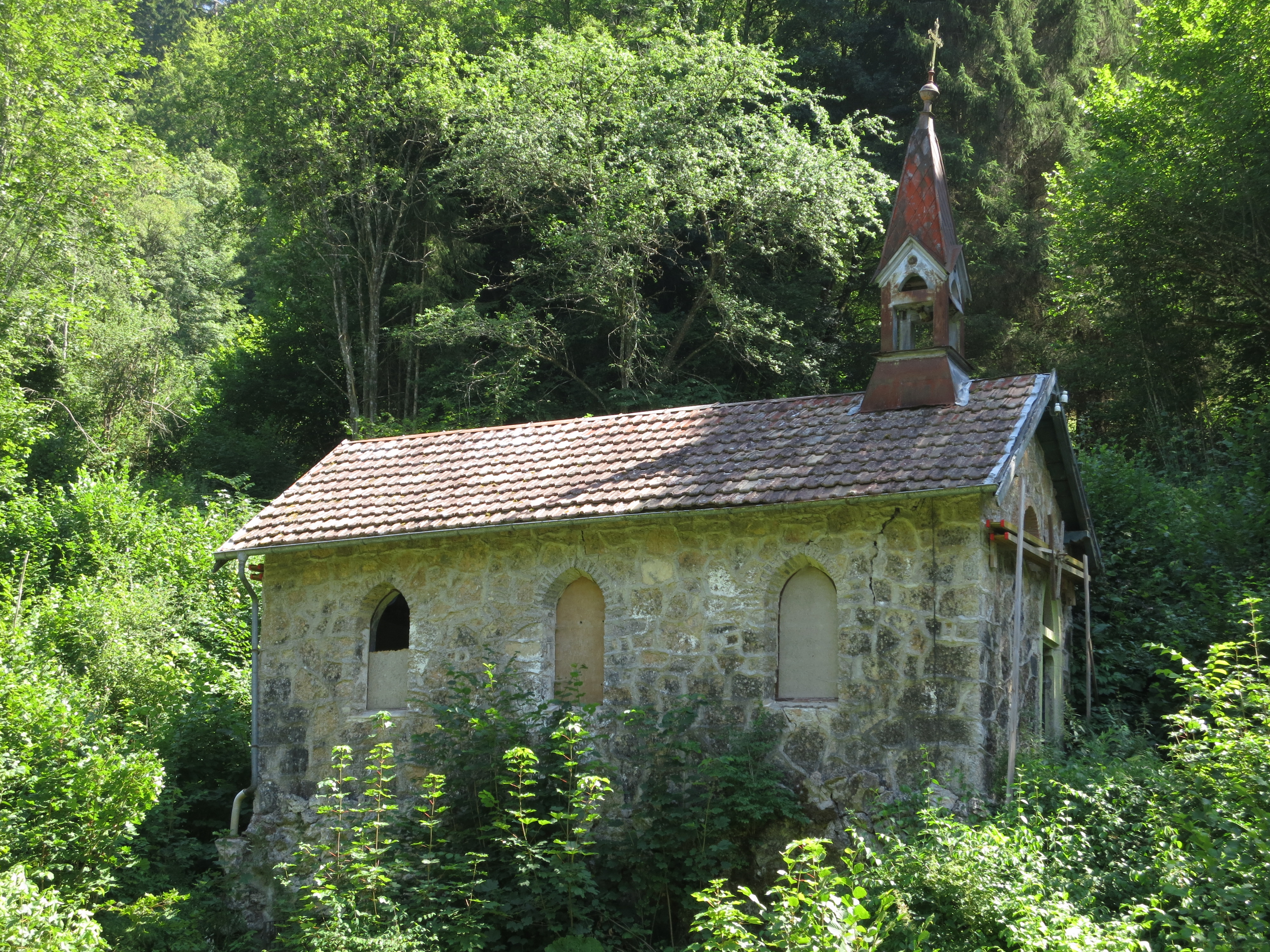 Kapelle beim ehemaligen Bad Boll in der Wutachschlucht im Südschwarzwald.